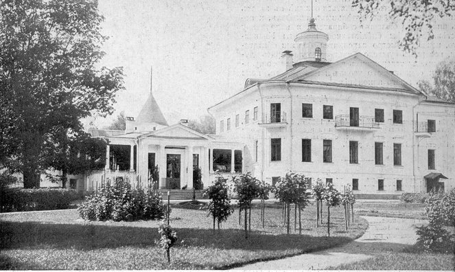 Усадьба князей Козловских в селе Ивановском Клинского уезда